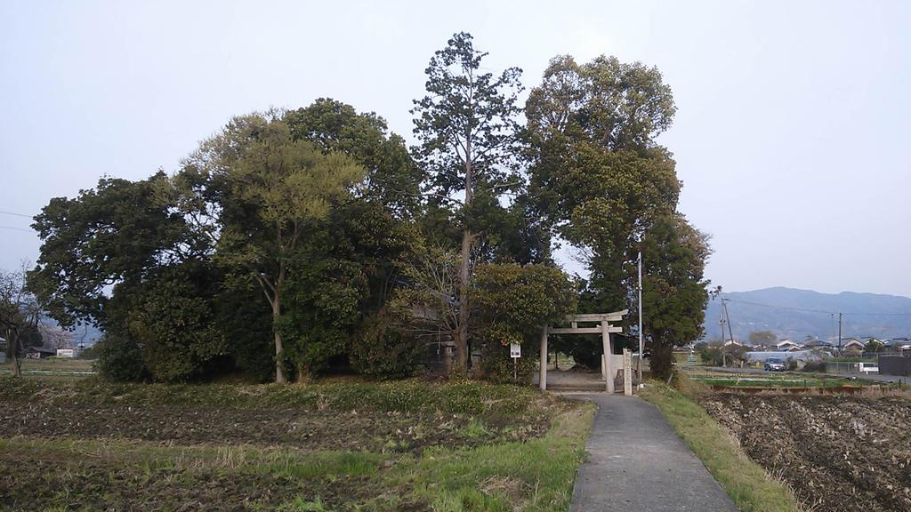 岐多志太神社社叢